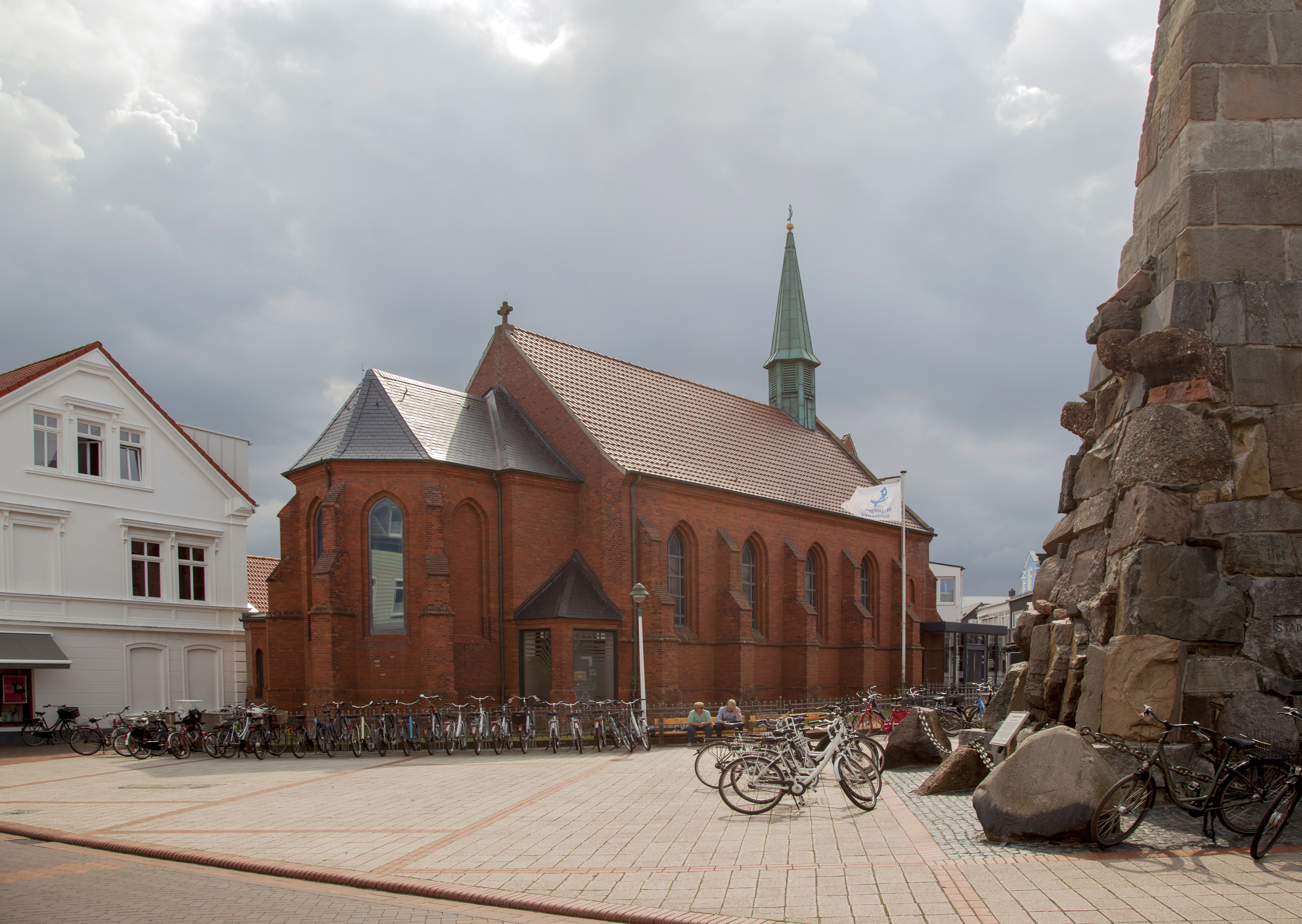 Norderney - St. Ludgerus - Außenansicht